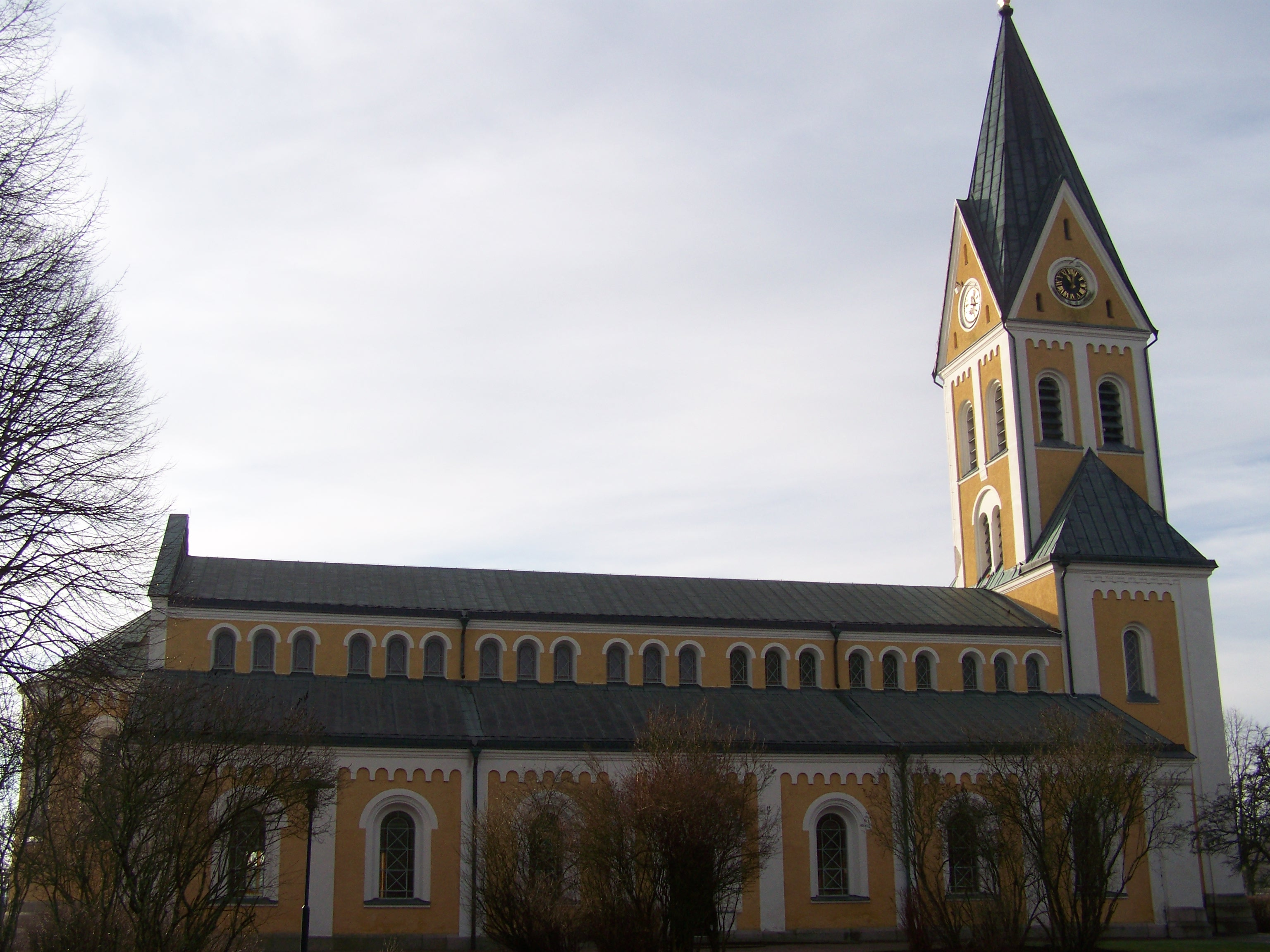 Bräkne-Hoby, Kirche, Seitenansicht